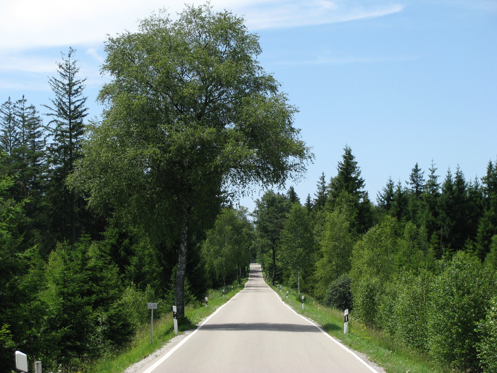 Staatsstraße 2055 zwischen Rott und Dießen am Ammersee im Bereich Staatsforst Bayerdießen/Vilgertshofener Forst